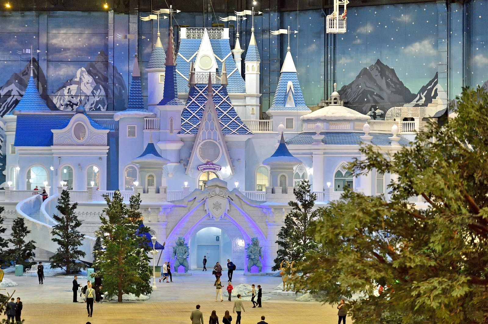 Владимир Путин и Сергей Собянин посетили новый парк развлечений «Остров Мечты»